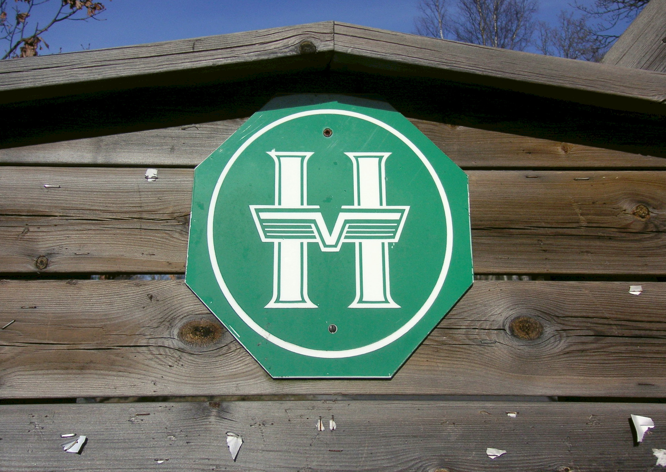 Hellasgården